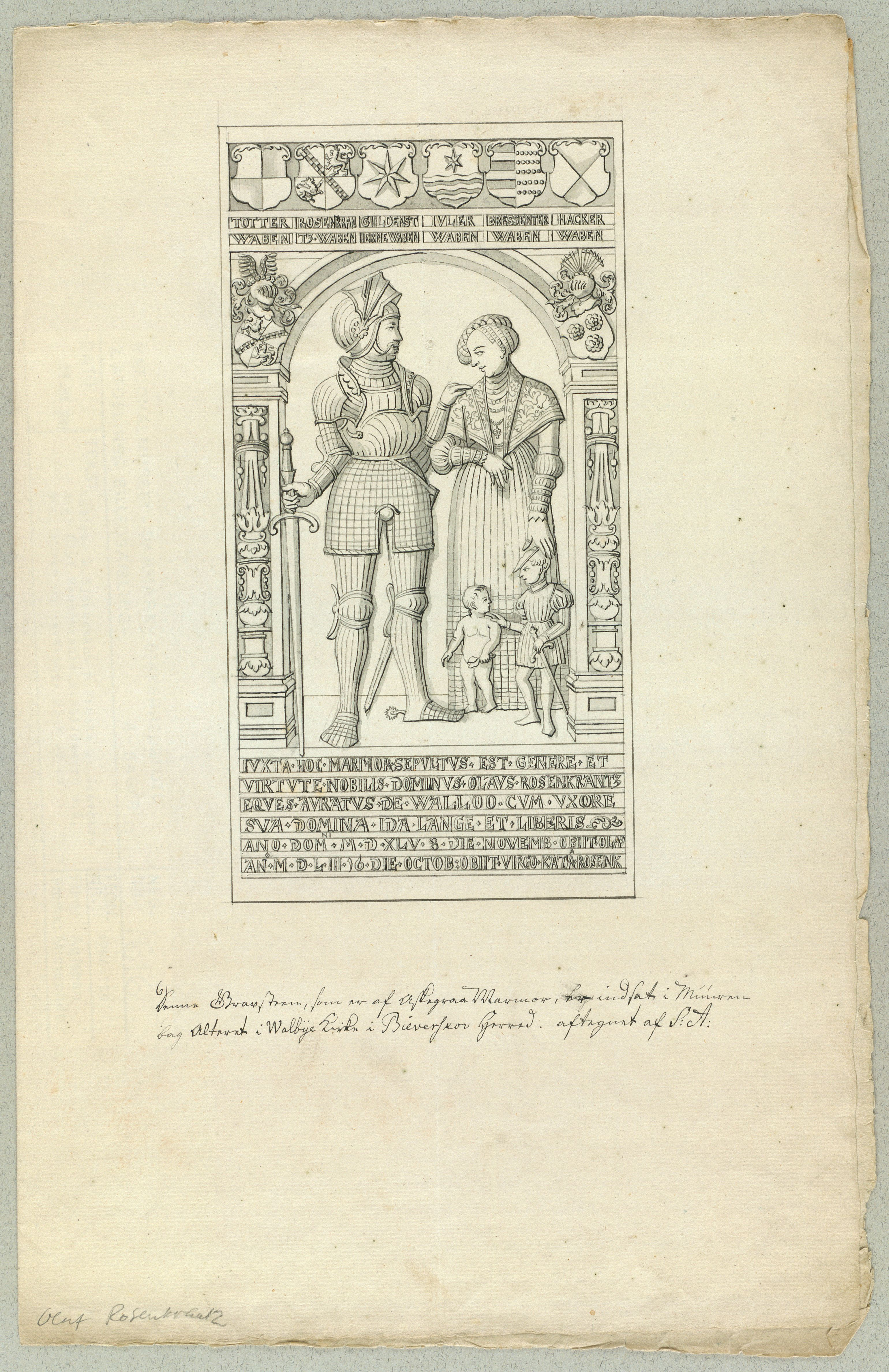 Gravsten over Oluf Rosenkrantz, †1545, med hustru Ide Lange og datteren Karen, †1553, Valløby Kirke